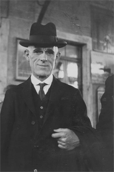 ירושלים - הרי סנל חבר ועדת החקירה - ב"כ הפועלים